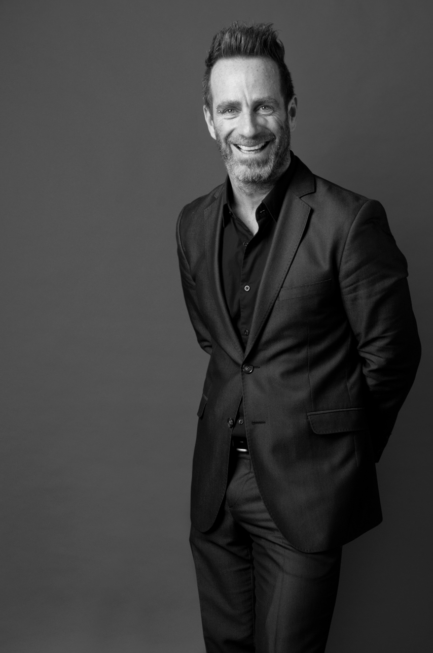 © Rojkind Arquitectos, foto por Juan Rodrigo Llaguno